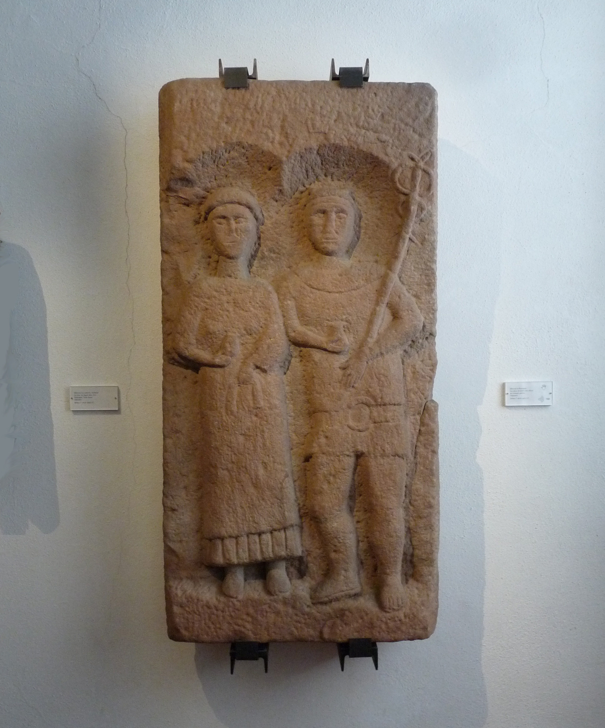 Stèle représentant Mercure et Rosmerta, vêtus du costume gaulois. Début du 4e siècle après JC. Trouvé à Châtenois (Bas-Rhin). Musée archéologique de Strasbourg.